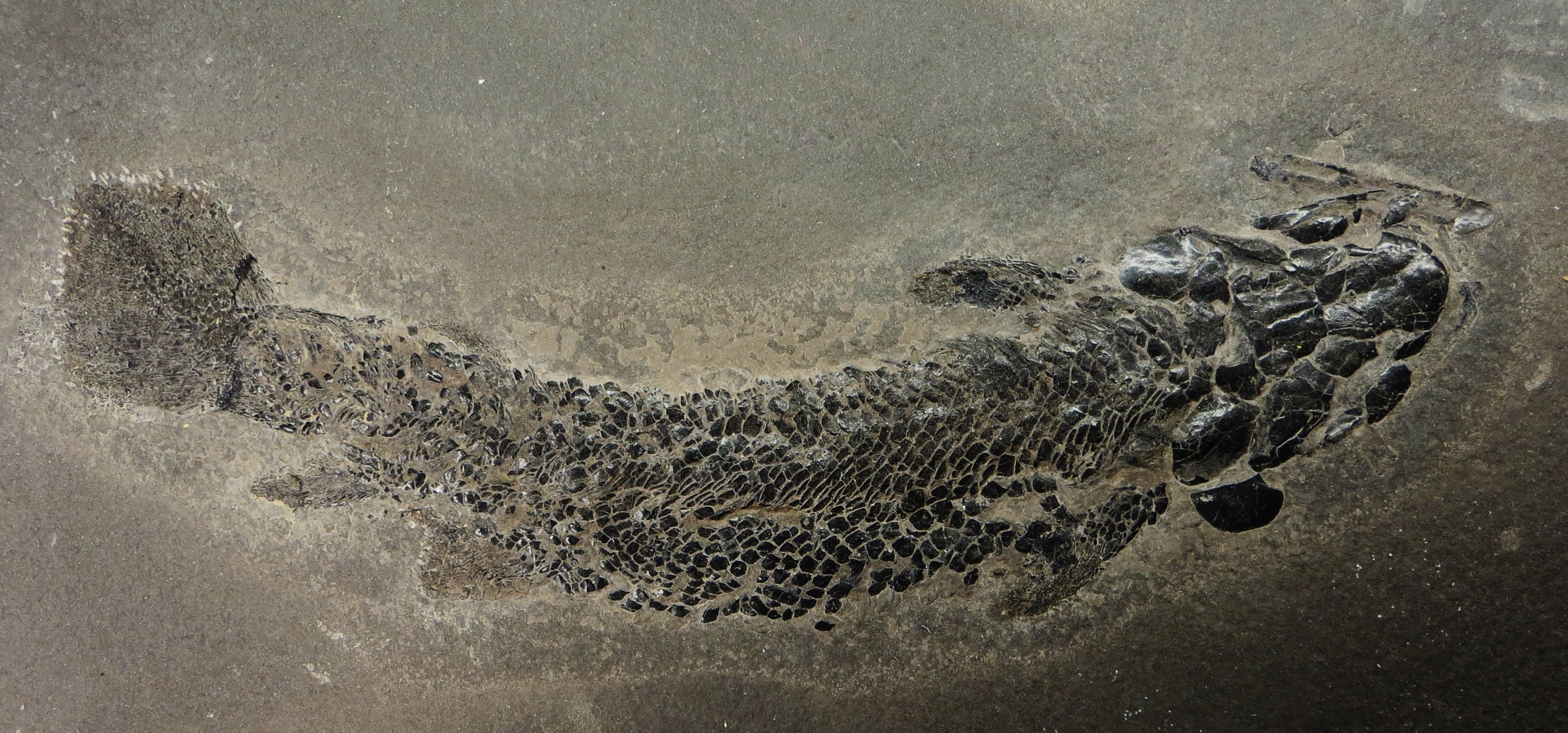 Fossil of Gyroptychius, an extinct fish- Took the picture at Naturalis, Leiden